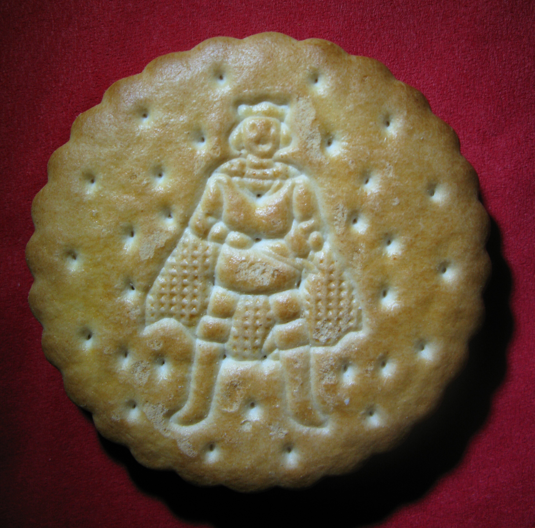 Prinzenrolle